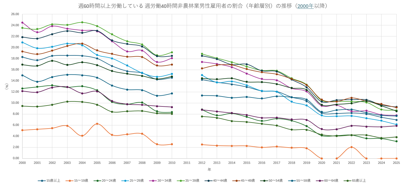 年齢階級別男性非農林業労働者に占める週60時間以上労働者の者が占める割合推移（2000年以降）